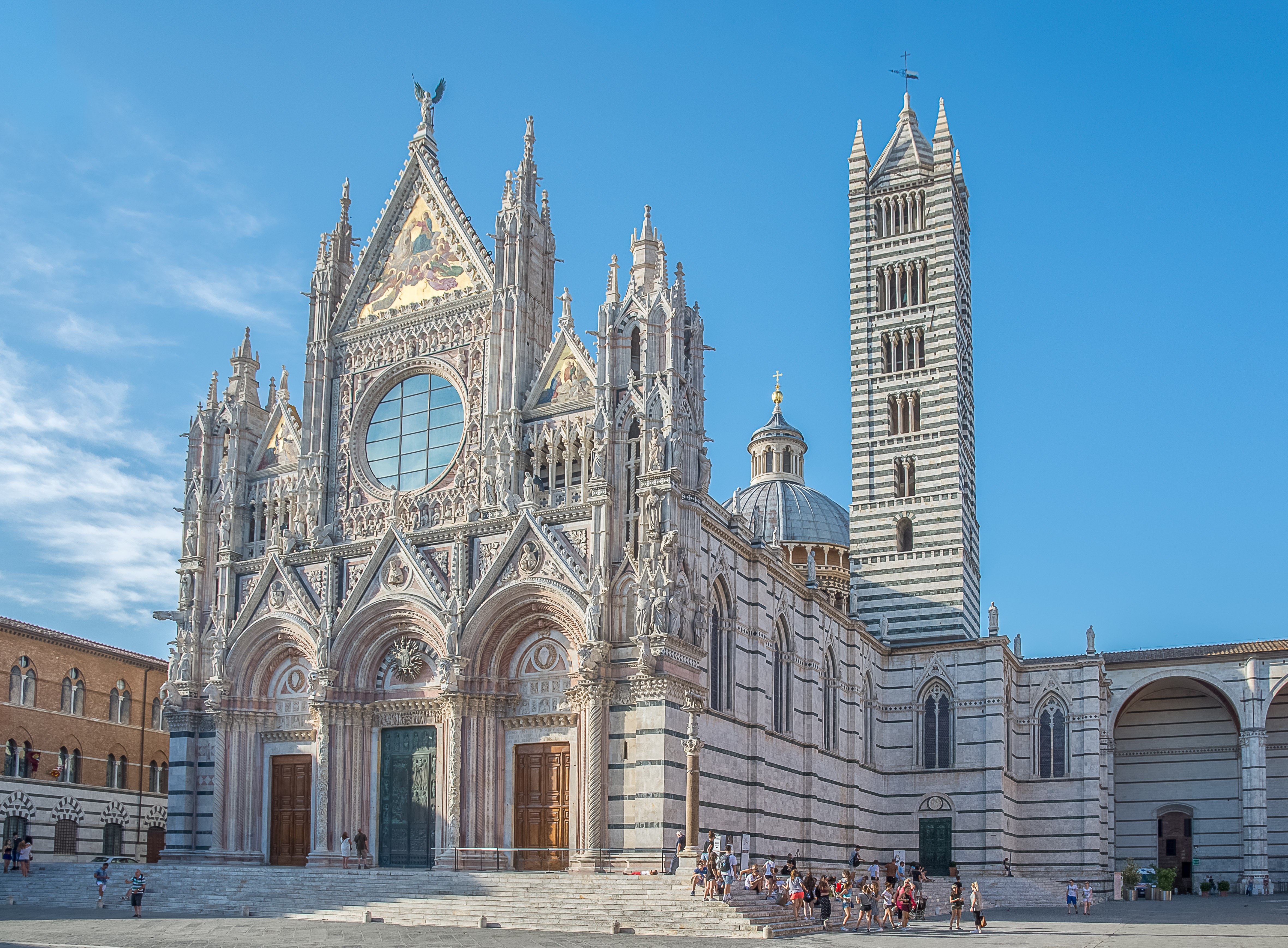 Duomo di Siena Cattedrale Metropolitana di Santa Maria Assunta (nizio costruzione - 1220 circa, Completamento 1370 circa)